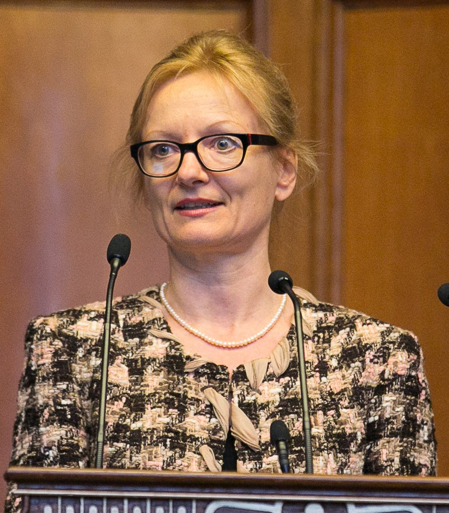 Foto von Prof. Gerda Falkner anlässlich der Eröffnung des EIF am 3.12.2012 im Festsaal der Universität Wien